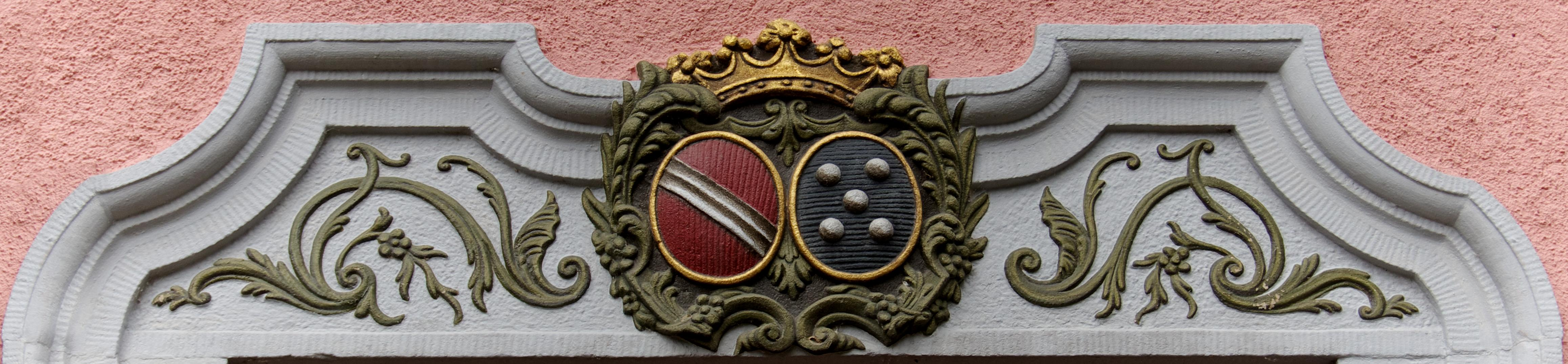 Schlosskapelle Stegen-Weiler Türfassung des Schlosses